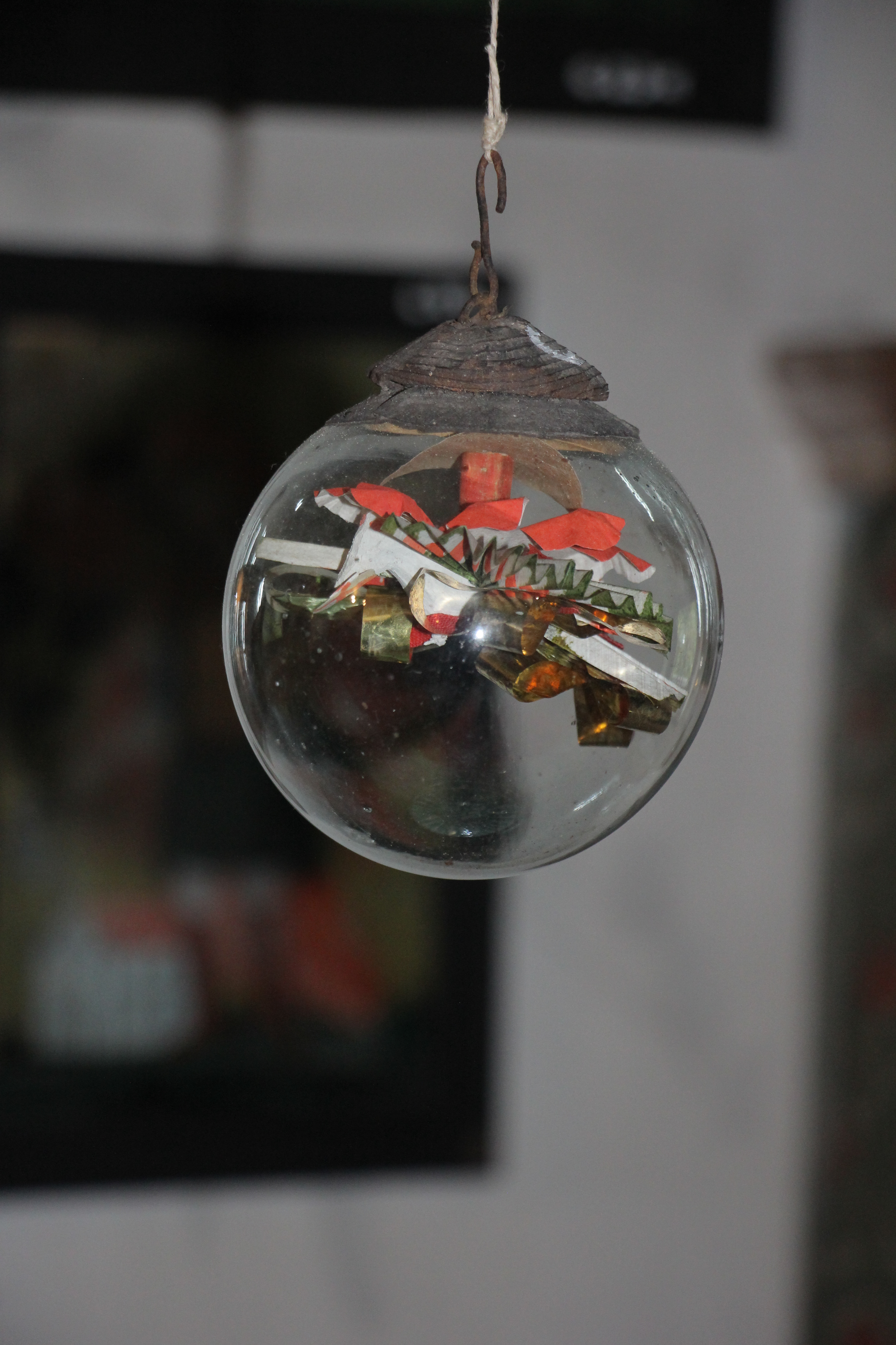 Heimathaus mit Glockengießerei in Braunau am Inn